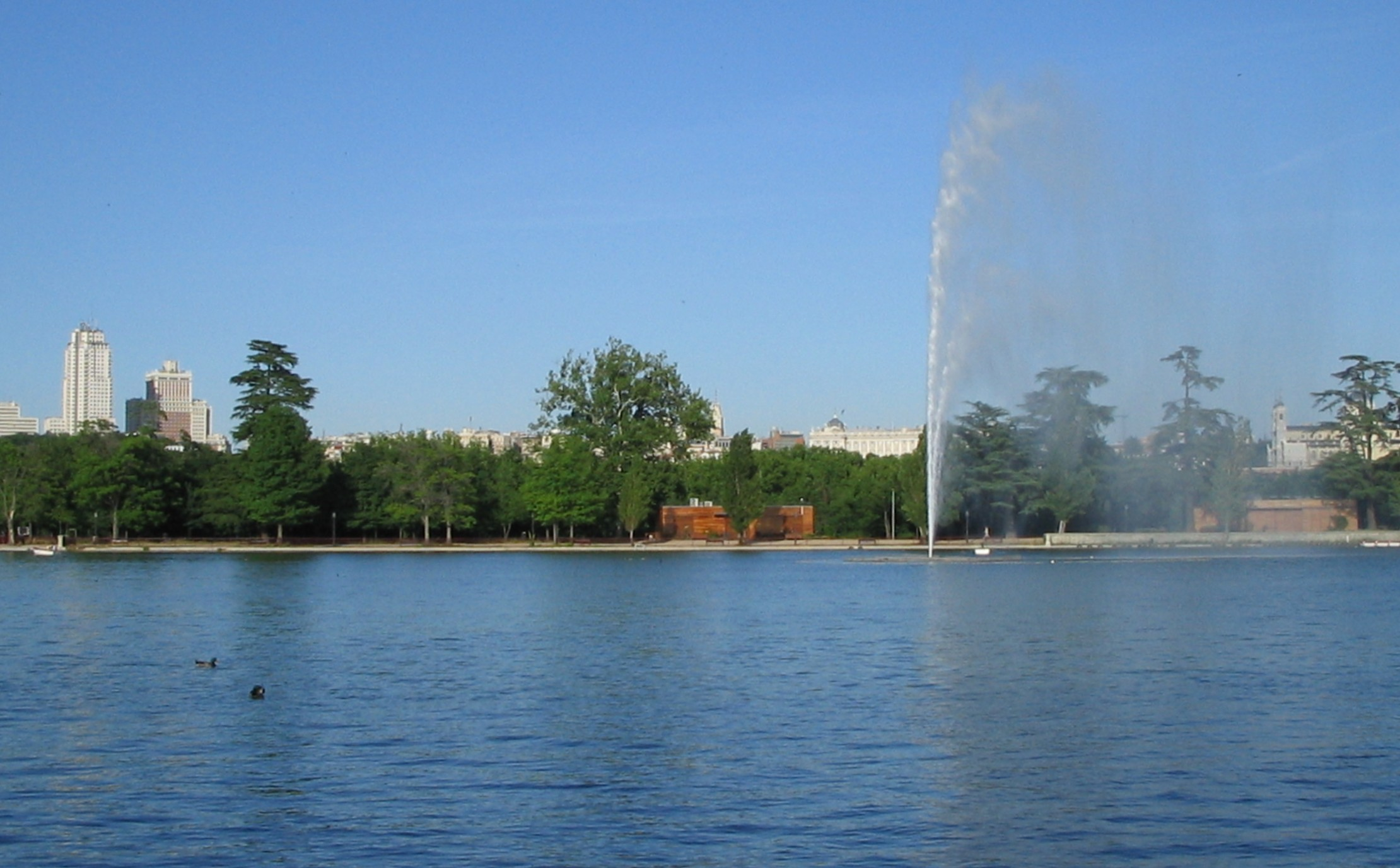 Lago de la Casa de Campo de Madrid.